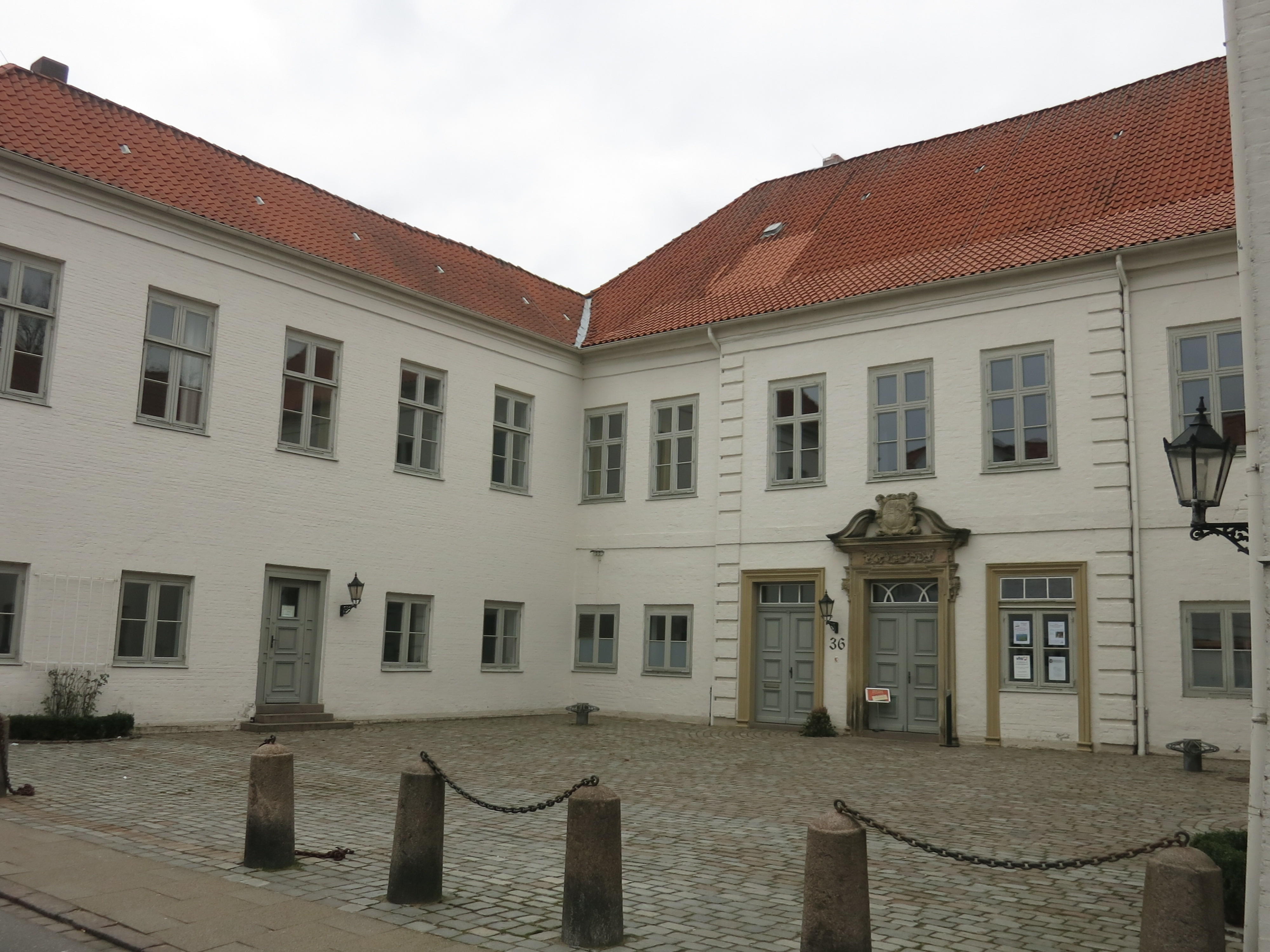 Haus Volkshochschule Glückstadt e.V. im Wasmer Palais Königstraße